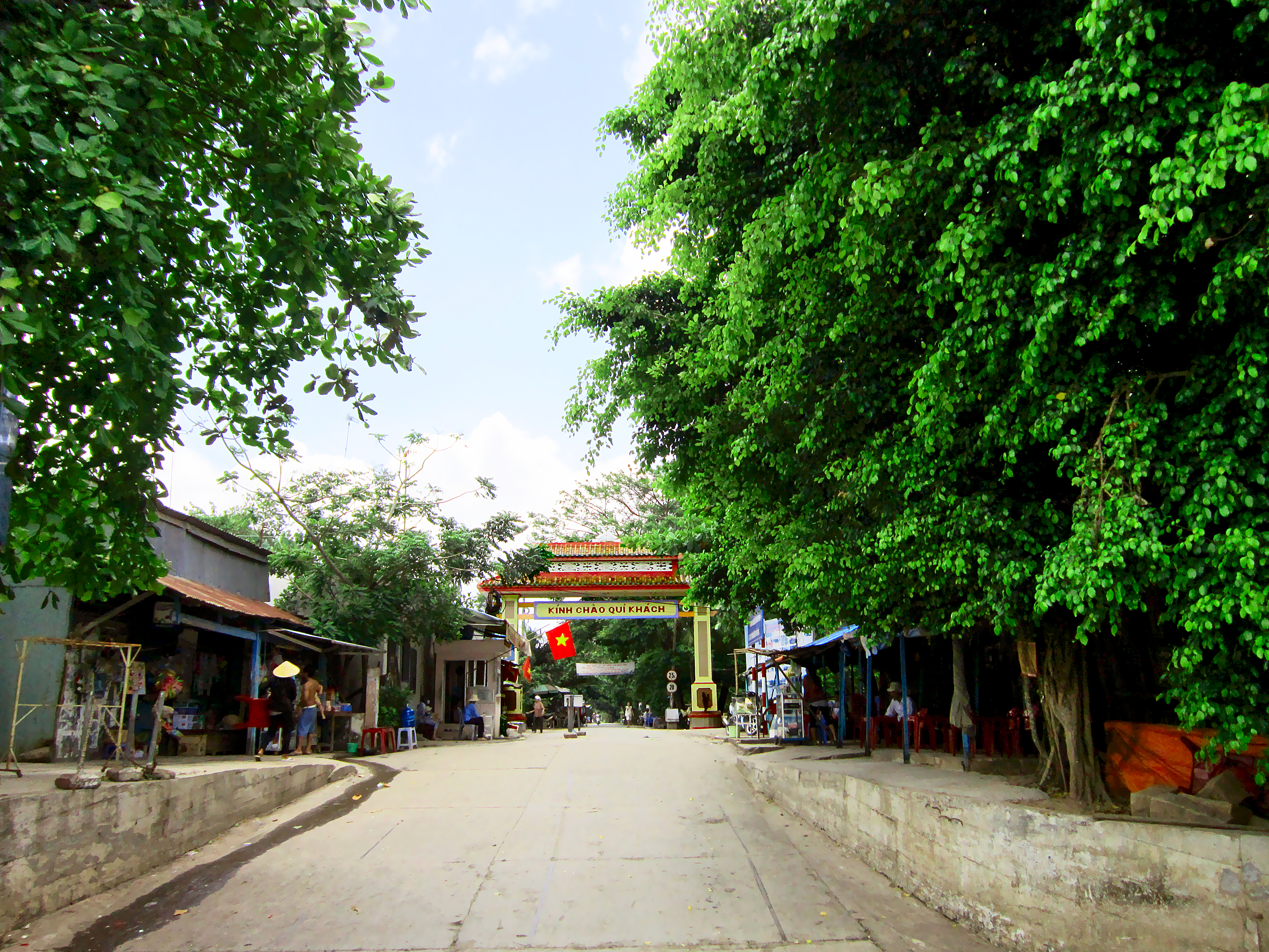 Cổng chào của xã Mỹ Hòa Hưng dựng tại bến phà Trà Ôn (bờ xã Mỹ Hòa Hưng), thuộc TP. Long Xuyên, tỉnh An Giang, Việt Nam.